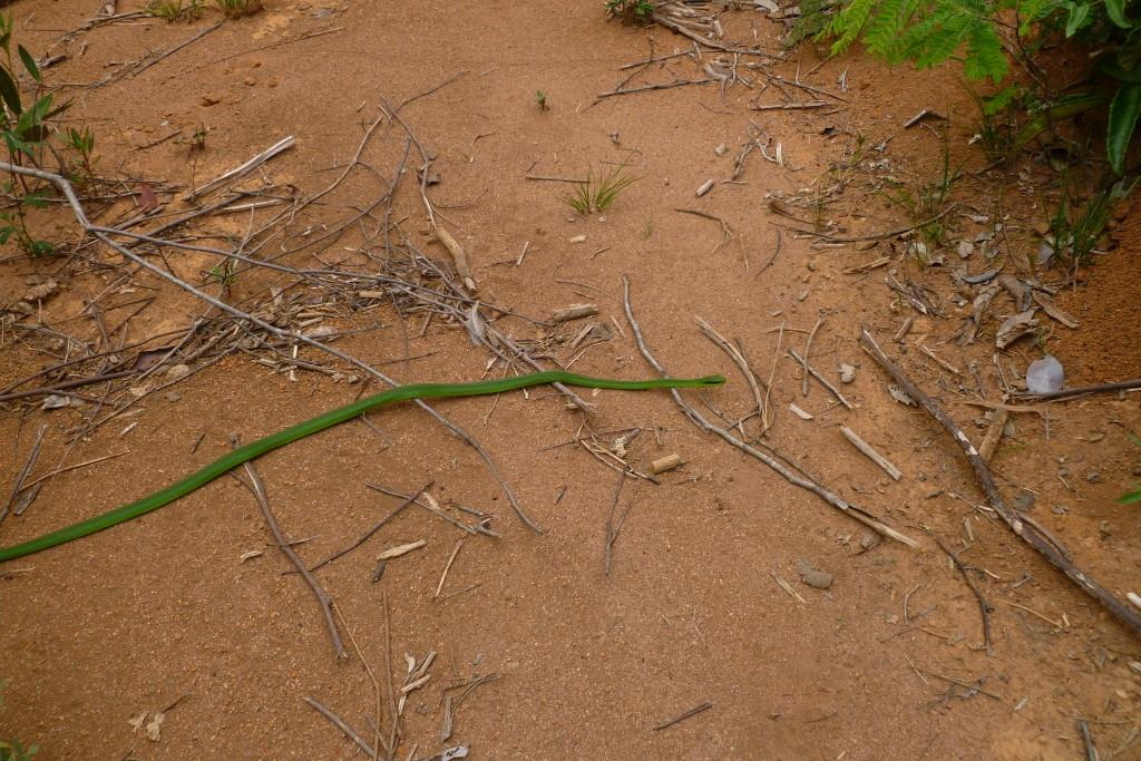 Philodryas olfersii, vulga Cobra-Verde, em meio a regeneração de Floresta Estacional Decidual.